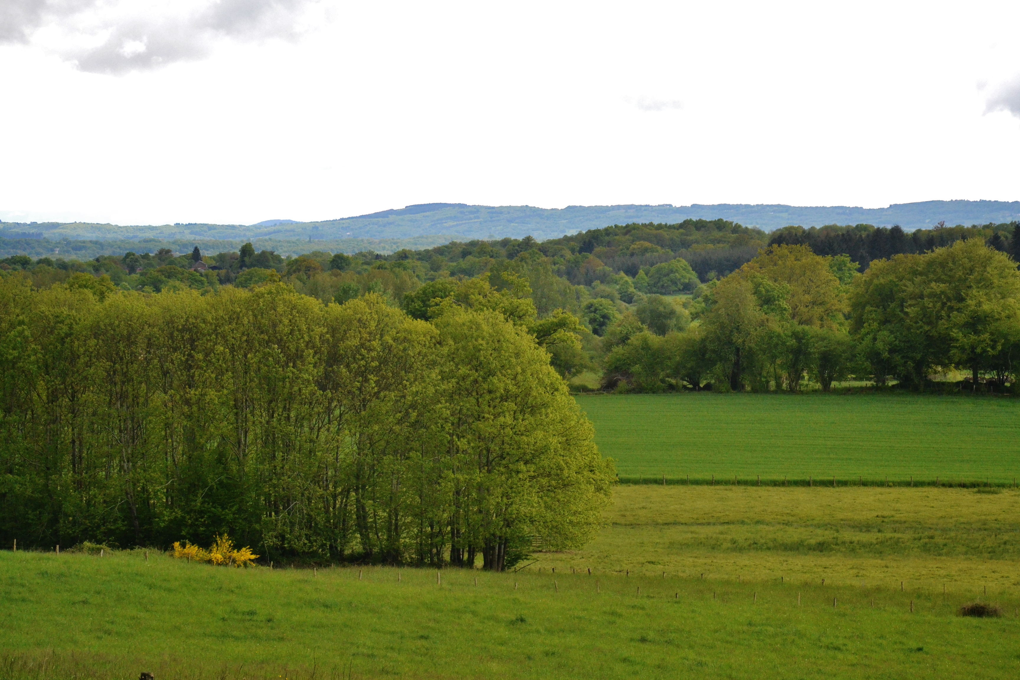 La campagne creusoise, au fond, les monts d'Ambazac (Saint-Maurice-la-Souterraine, Creuse, France)